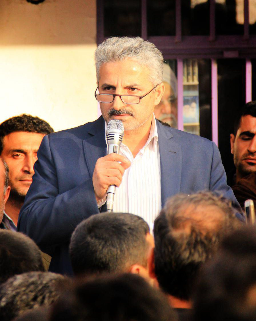 ذبیح‌الله نیکفر لیالستانی (متولد شهریور ۱۳۳۴ در روستای لیالستان) نمایندهٔ منتخب لاهیجان و سیاهکل در مجلس شورای اسلامی است. او که پزشک عمومی و دبیر بازنشسته است، وی در دهمین دوره ی انتخابات مجلس شورای اسلامی به عنوان کاندیدای مستقل از مجموع ۹۱۸۶۰ رأی صحیح مأخوذه، ۴۷۳۴۱ رای را به دست آورد و بر نمایندهٔ دوره ی نهم لاهیجان ابوذر ندیمی پیروز شد. .